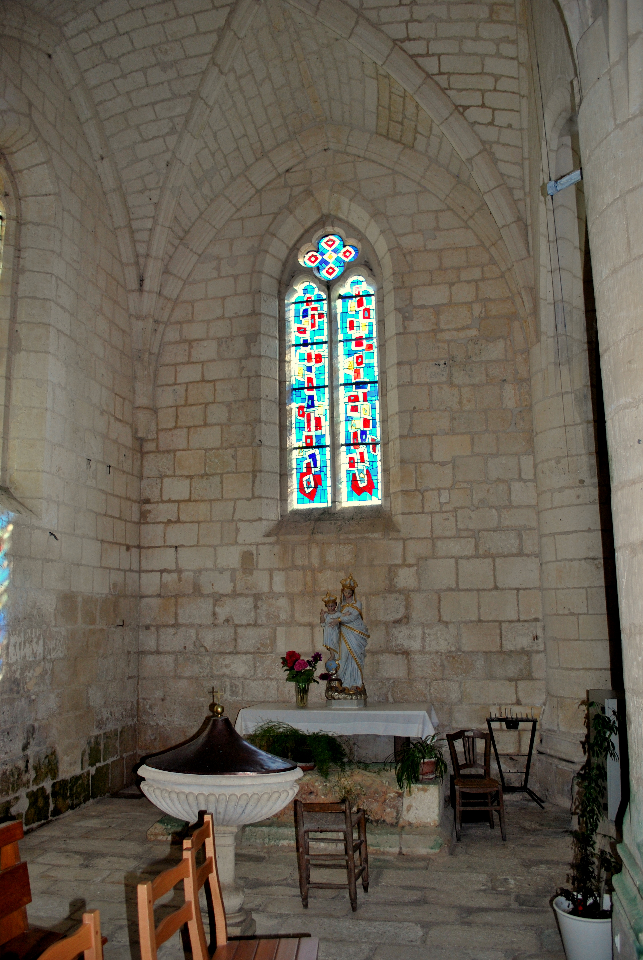 Corme-Royal église St Nazaire